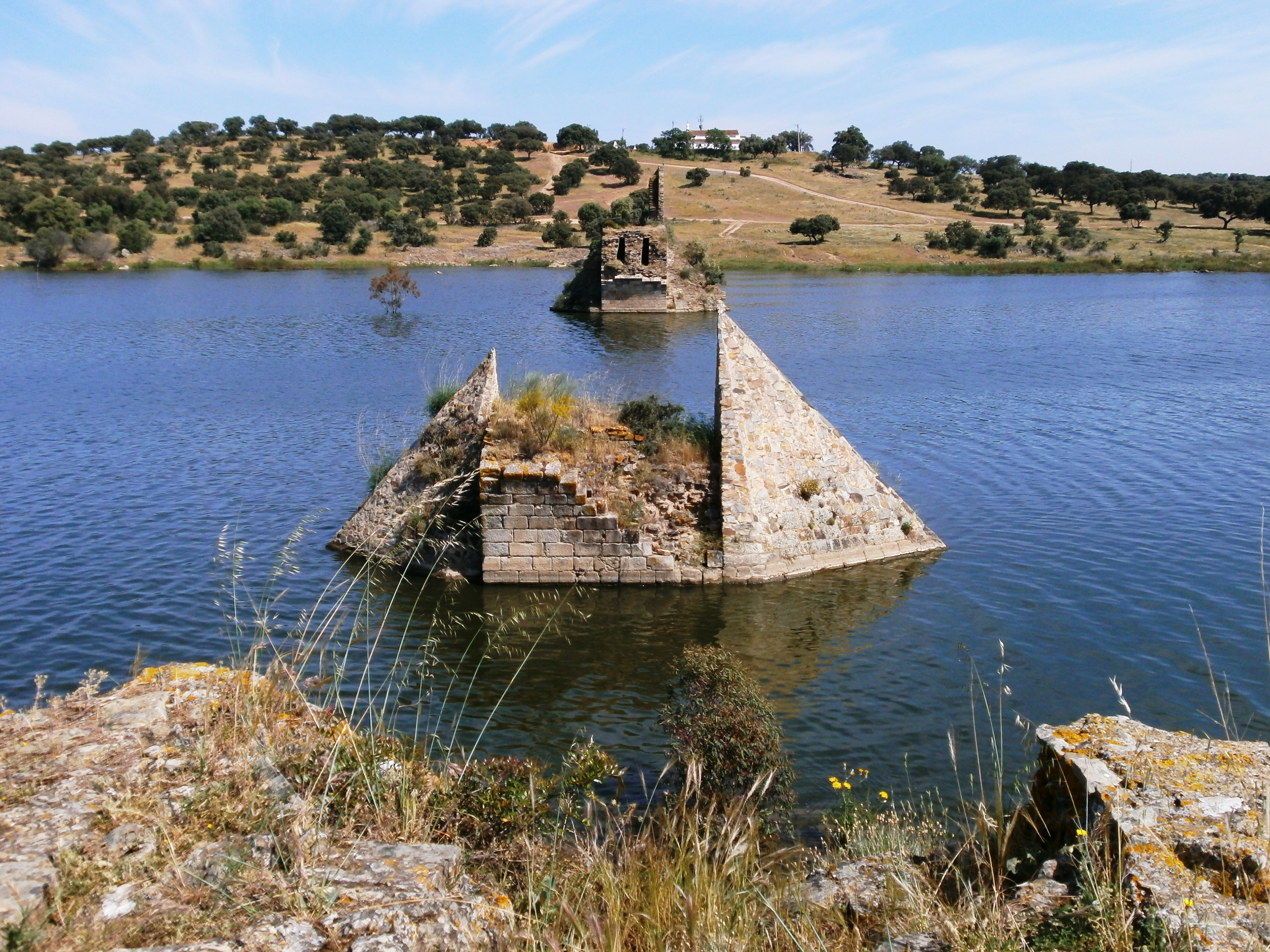 Puente fronterizo de Ayuda entre España y Portugal visto desde España. Arriba la ermita de Ayuda.